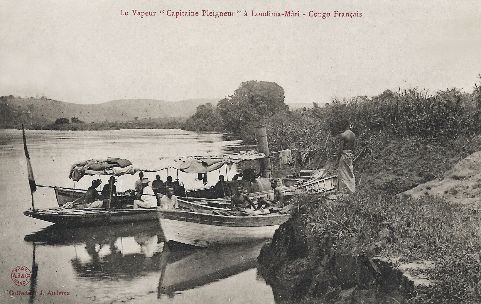 Le vapeur Capitaine Pleigneur à Loudima-Mari. Collection J. Audema. Phot. A.B. & Cie, Nancy [Albert Bergeret] Congo Français